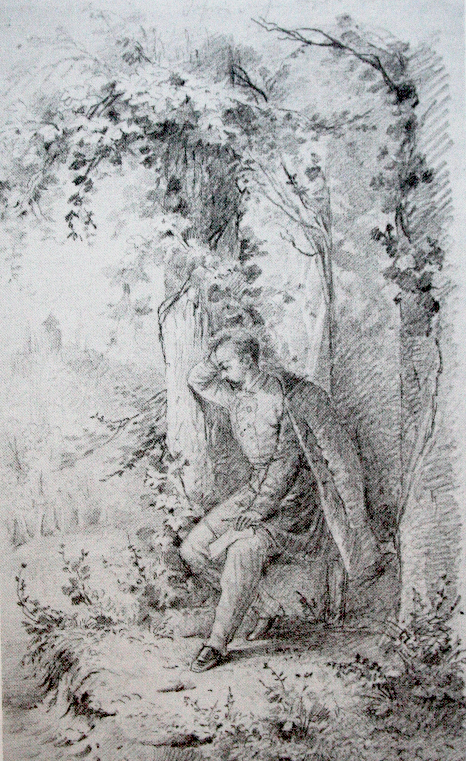 Selbstbildnis aus dem Skizzenbuch von 1868 von Karl Jauslin